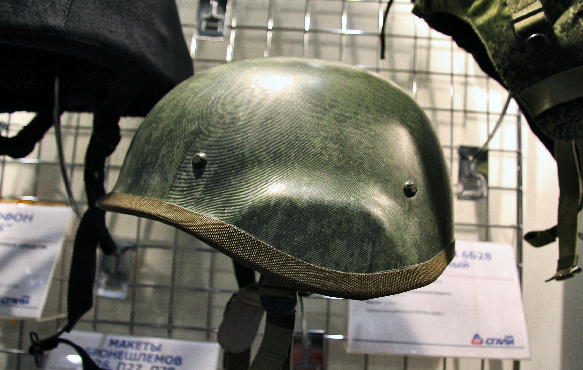 Модернизированный шлем 6Б27М (6B27M upgraded helmet)